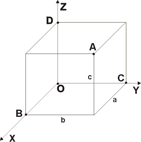 Прямоугольная система координат в пространстве